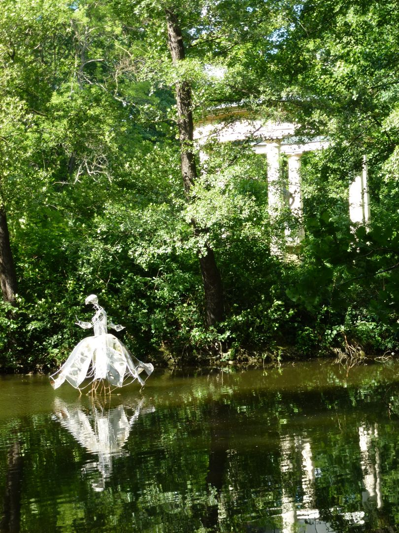 Installation "doppelt hell an dunklen Ufern" im Abtnaundorfer Park. Der Teich ist in einem Nebenschluss an die Parthe angeschlossen.